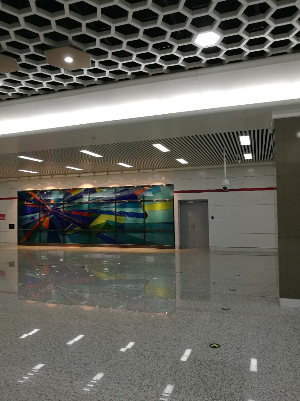 长春地铁南部新城站壁画